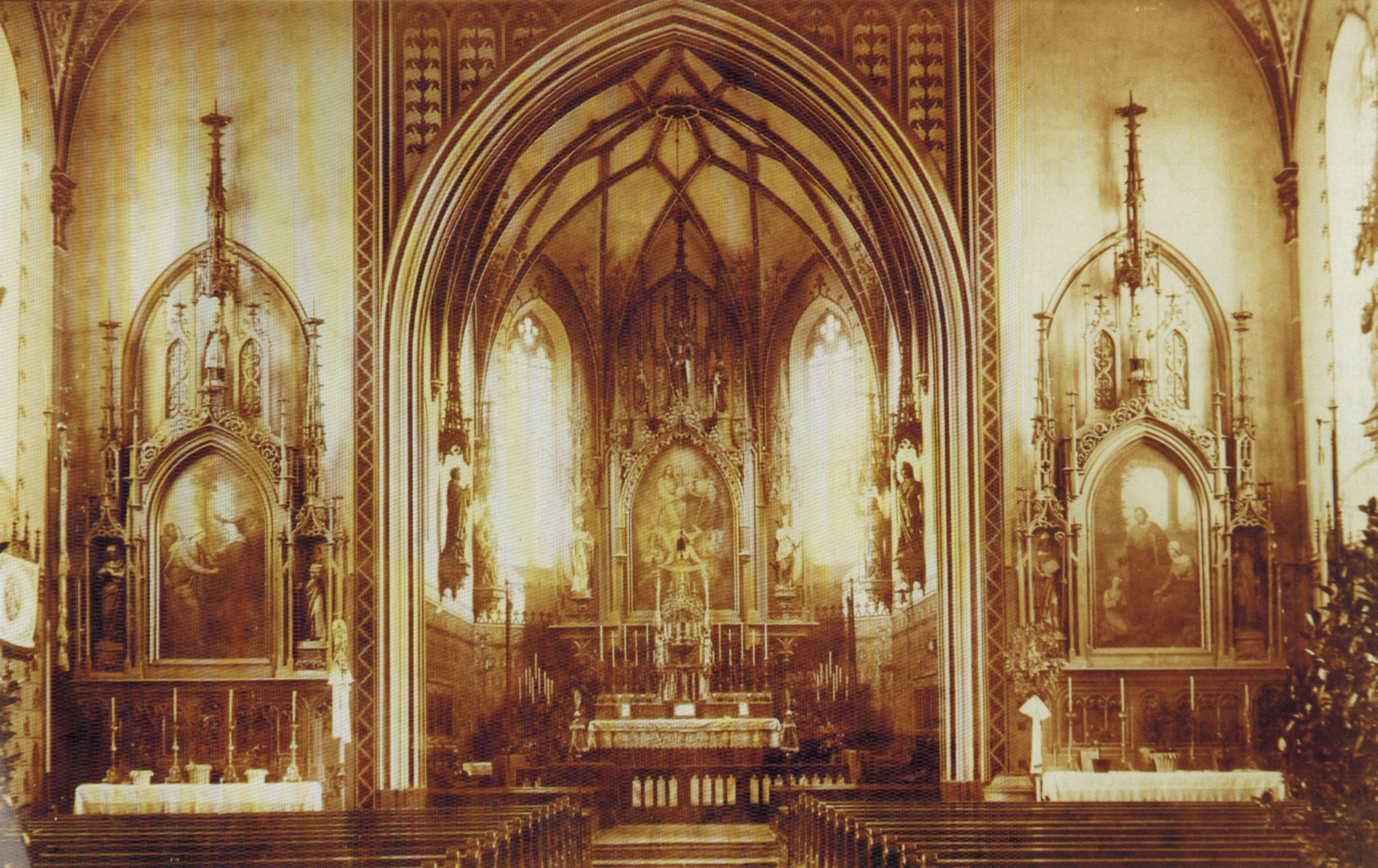 Die katholische Pfarrkirche Heiligste Dreifaltigkeit in Kriegshaber, neugotisch, vor Umbau und Zerstörung